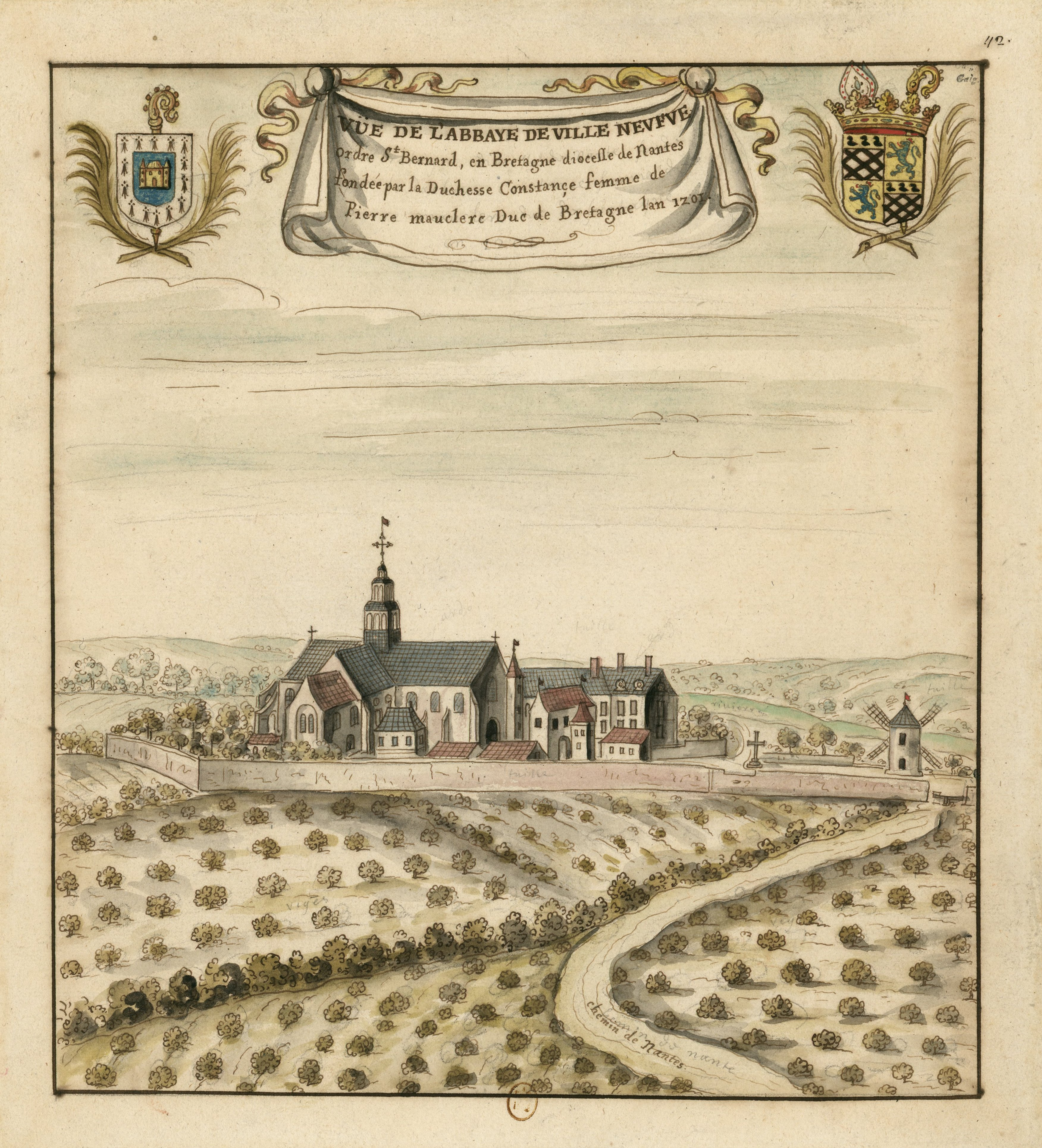 l'Abbaye de Ville Neufve // ordre St Bernard, en Bretagne, diocesse de Nantes